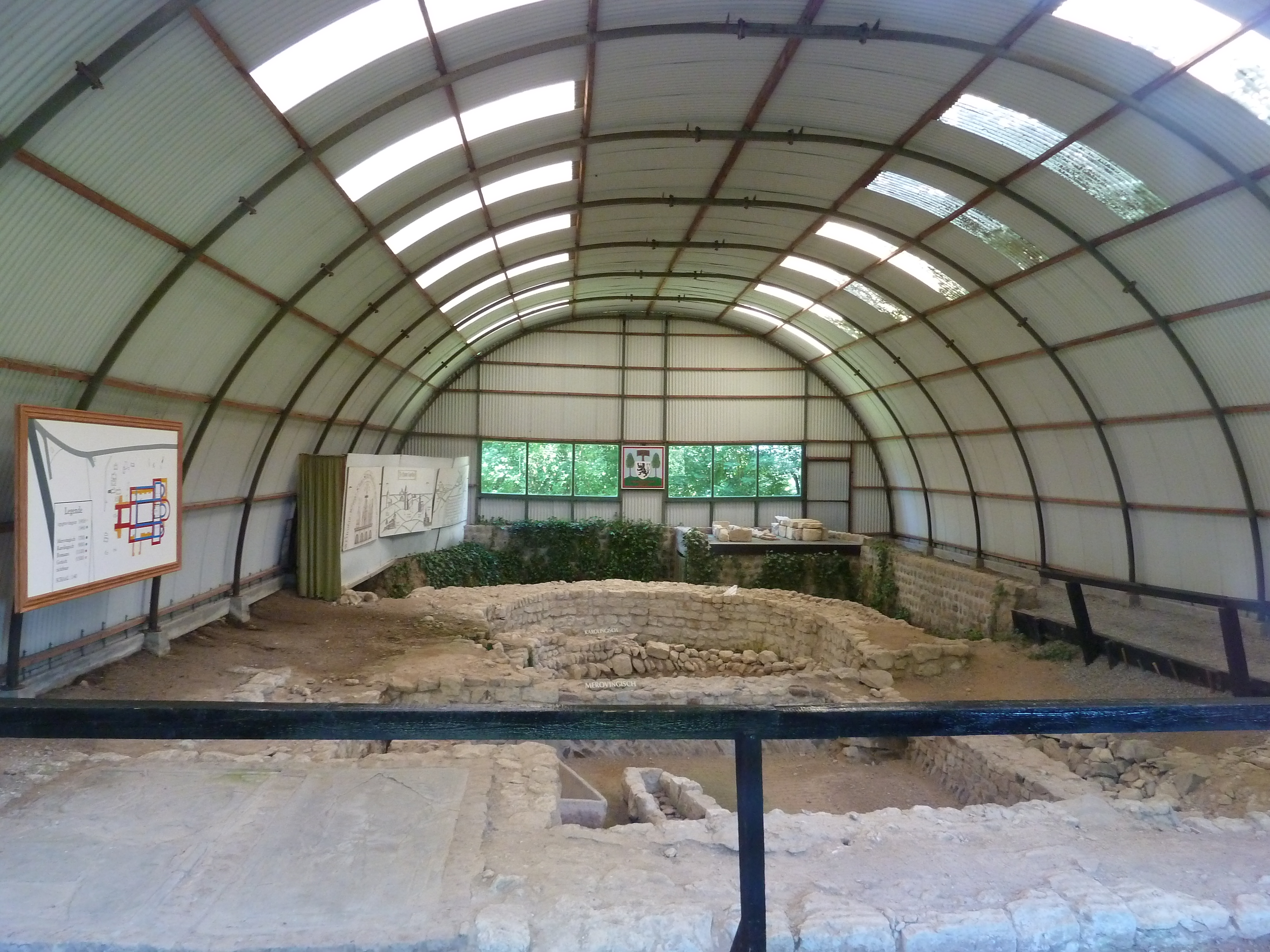 Blootgelegde fundamenten van de kerk te Sinte-Gitter, Landen, België